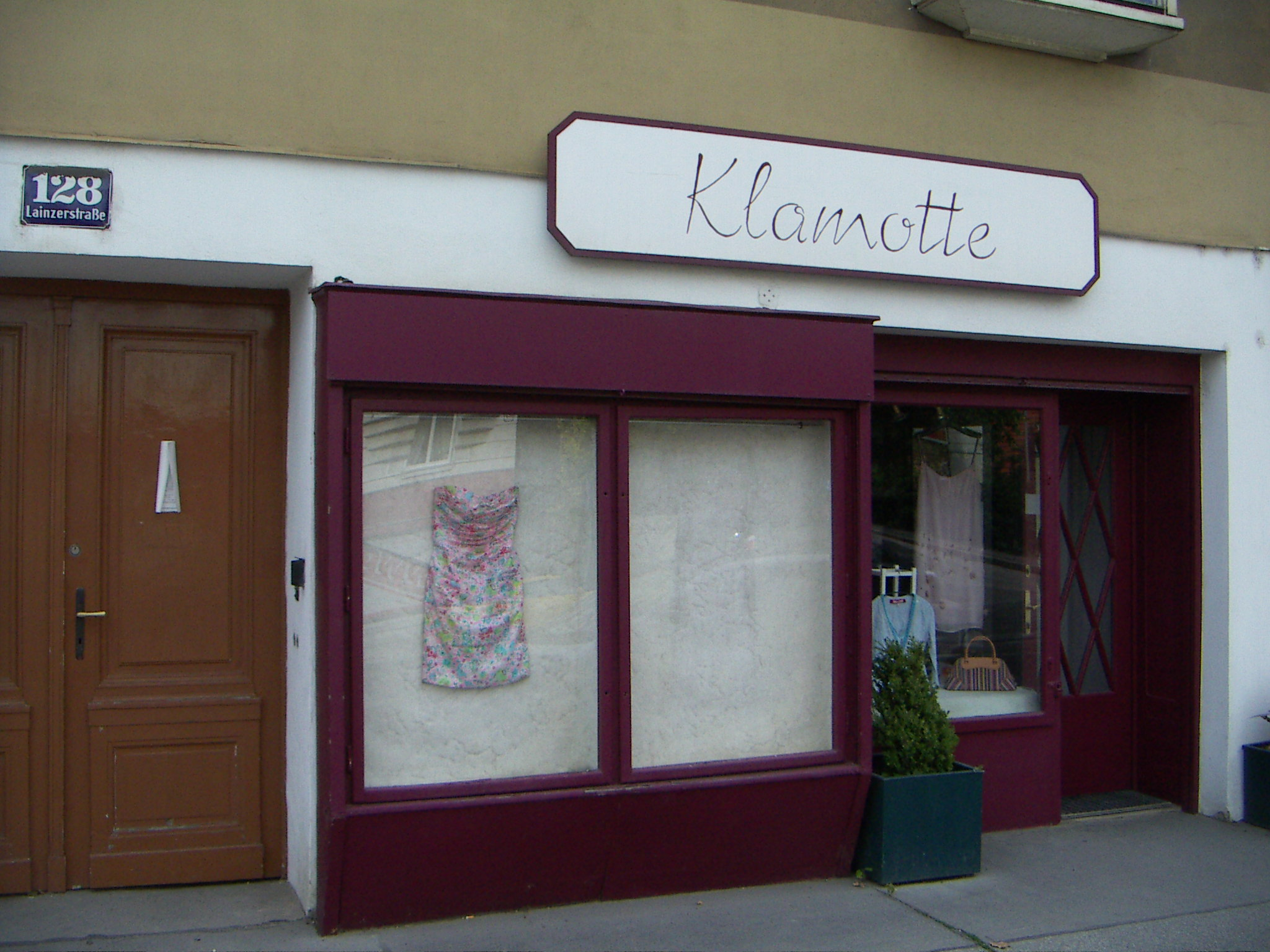 Klamotte, Einzelhandelsgeschäft in Wien Hietzing